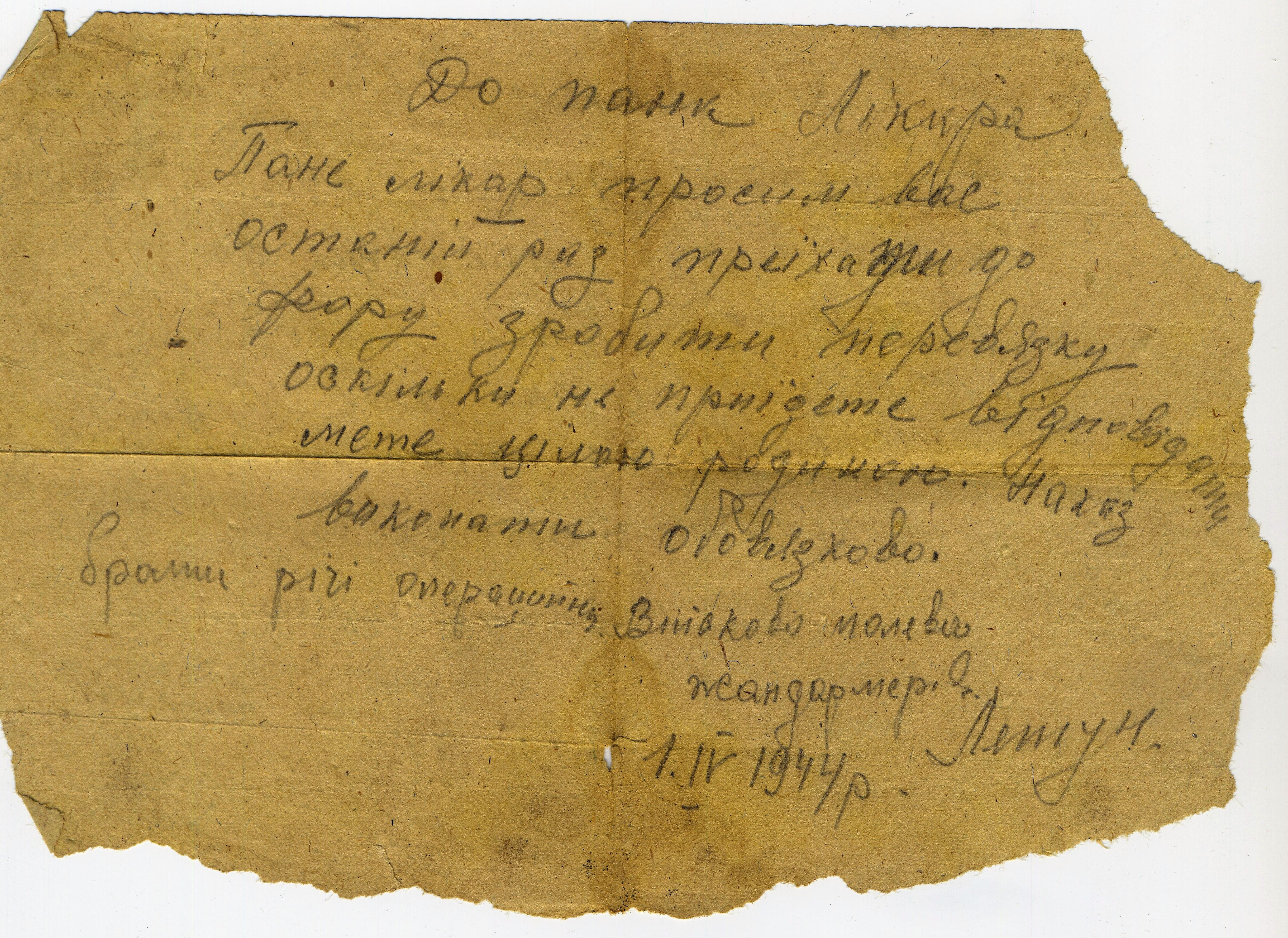 Записка залишена повстанцем ОУН–УПА для захисту сім'ї фельдшера Вячеслава Дацюка 1 квітня 1944 року.